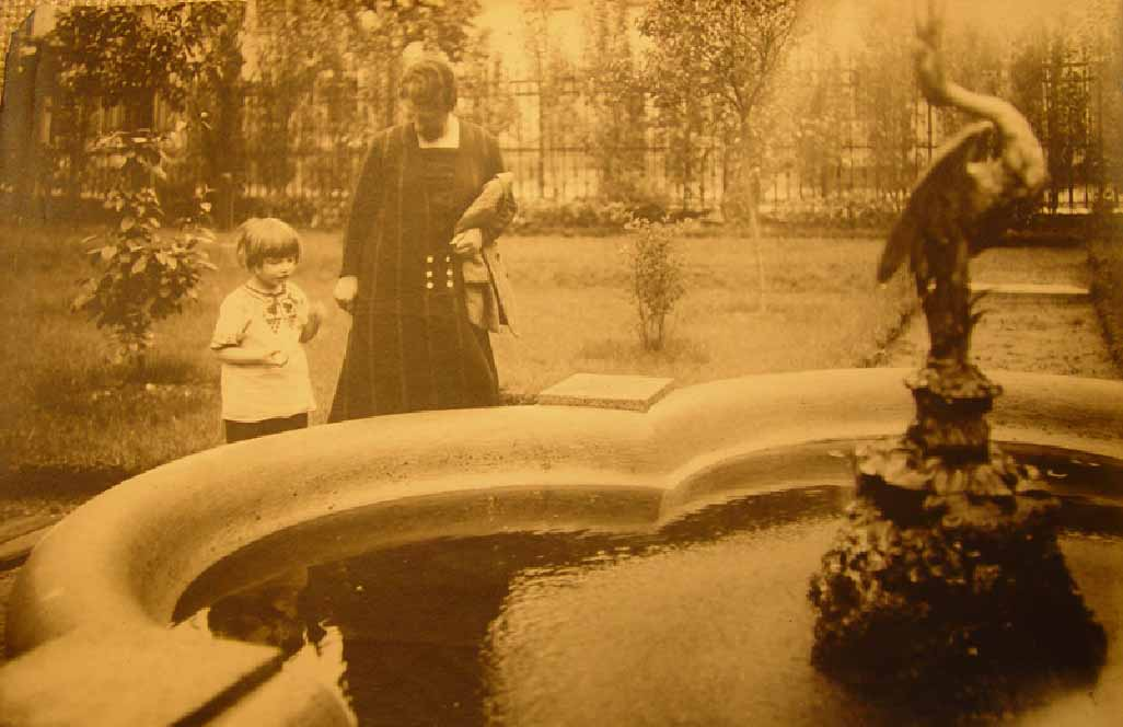 Ehemaliger Garten vom Haus Schützenstraße 1 in Bamberg, um 1920.